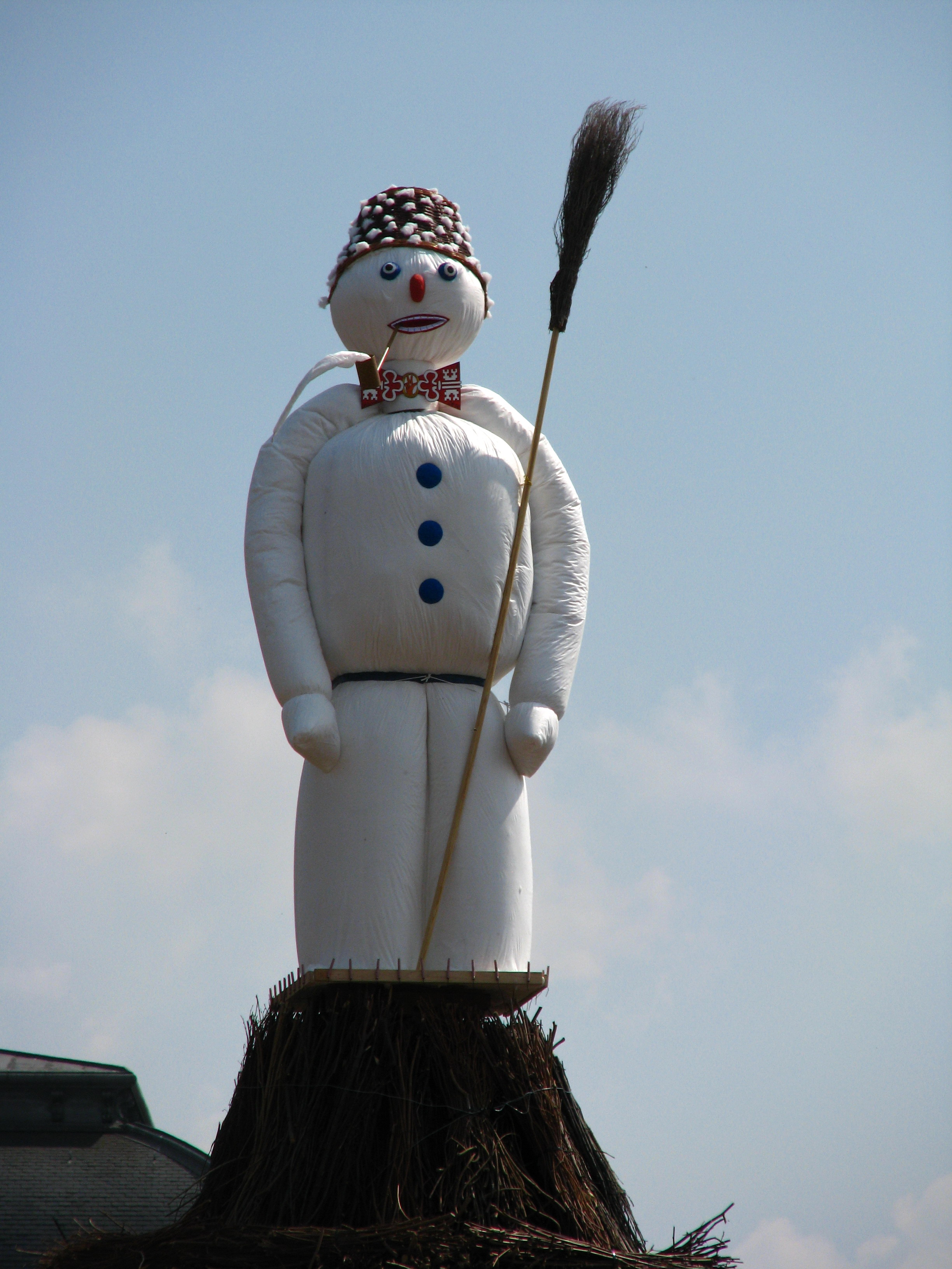 Sechseläuten on April 19, 2010, in Zürich (Switzerland)